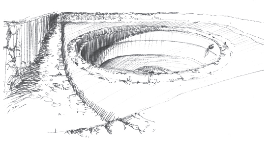 Cisterna Regina - Autore e fonte utente lupudilaguardia che la concede al pubblico dominio.